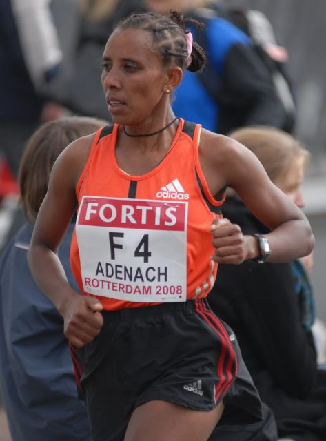 Zekiros Adenach during Rotterdam Marathon 2008